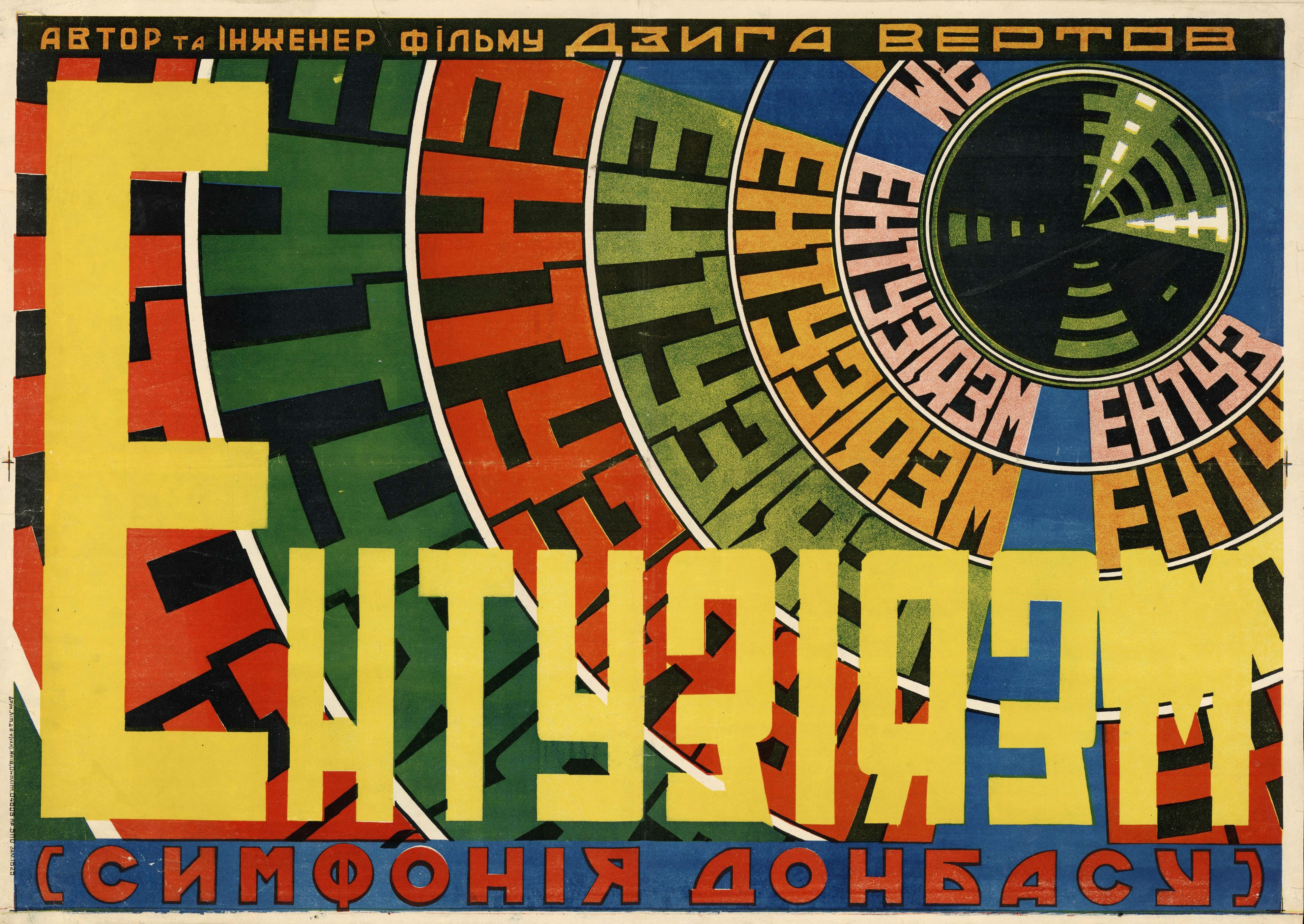 Плакат к документальному кинофильму «Энтузиазм (Симфония Донбасса)» (СССР, 1931; реж. Дзига Вертов). Киев : [б. и.], [1931] (Литография ДВУ (УАН)). Цветная литография, 1 л., 62×88 см, 500 экз.